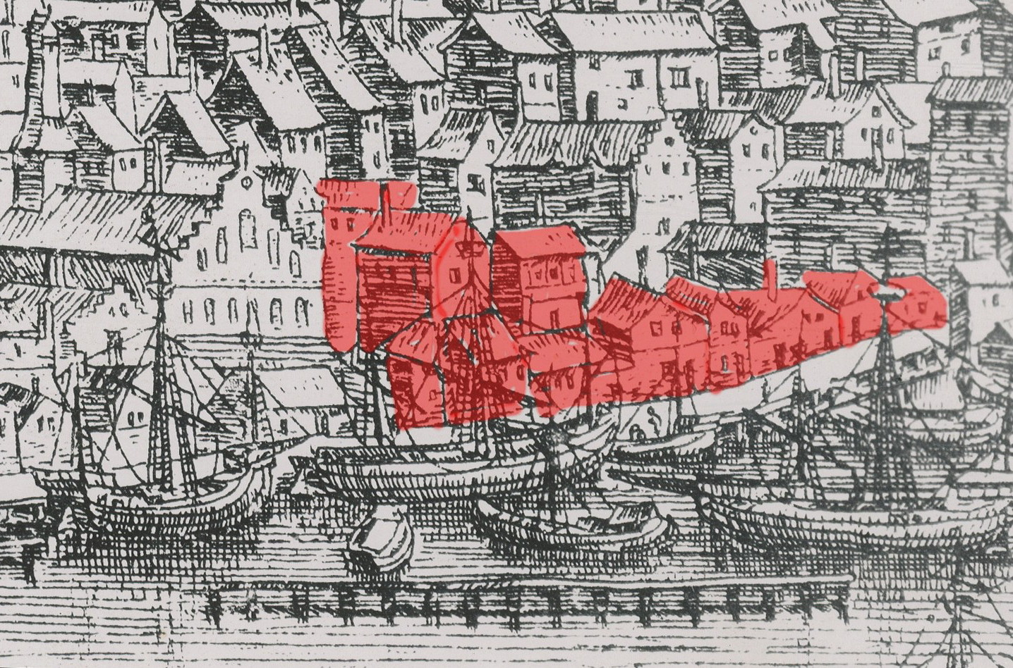 Frans Hogenbergs Stockholmsvy från sydost med bebyggelsen (rött) i nuvarande Kvarteret Proserpina (enligt Hans Hansson "Stockholms stadsmurar")